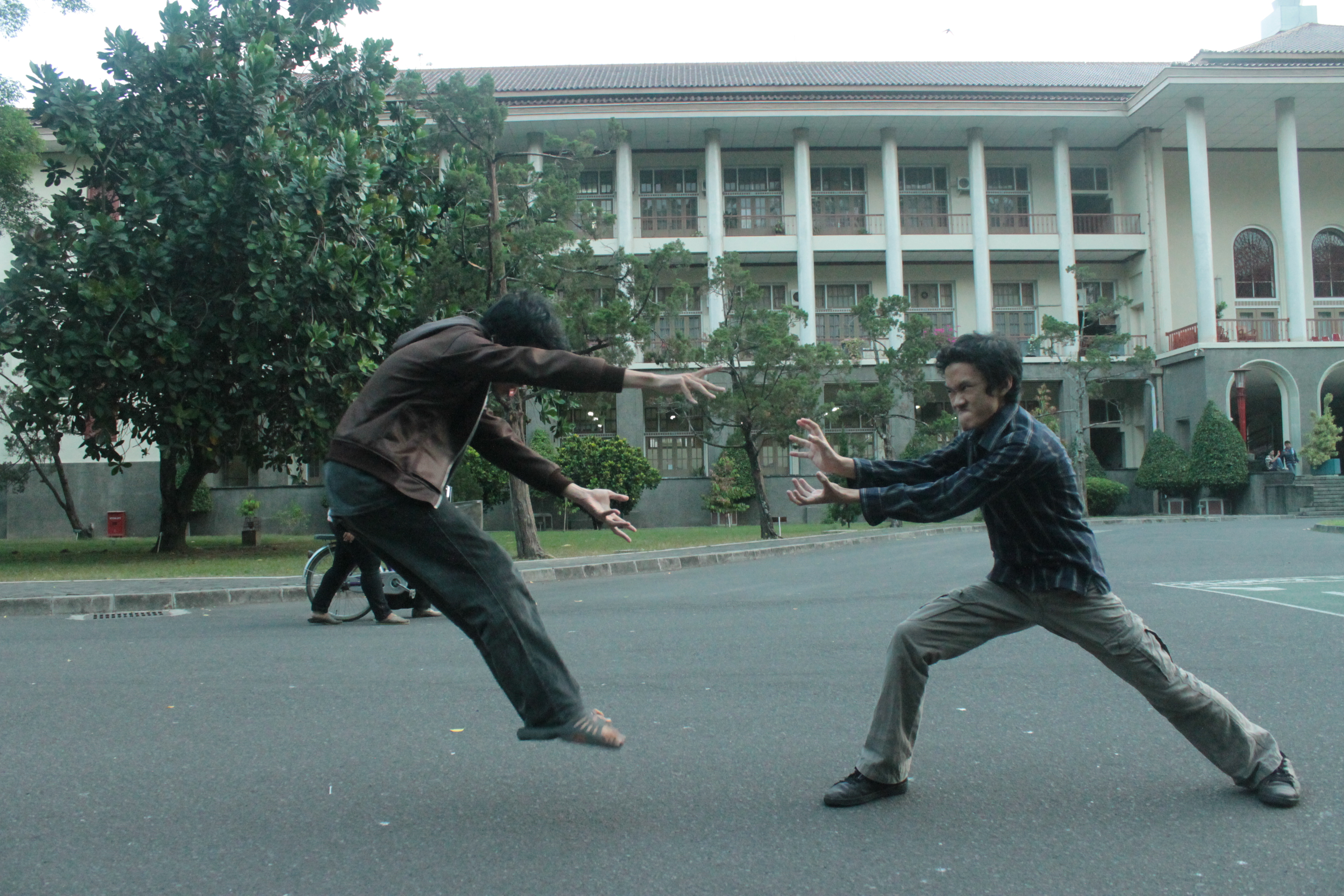 fotografi levitasi